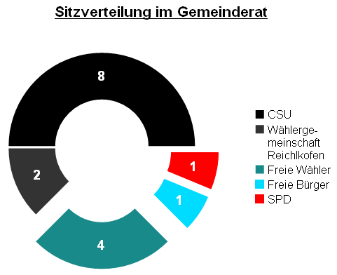 Sitzverteilung im Gemeinderat Adlkofen nach Kommunalwahl 2008